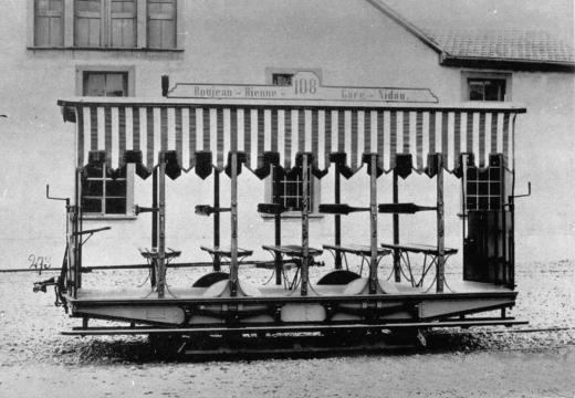 Sommerwagen Nr. 108 des Bieler Pferdetrams